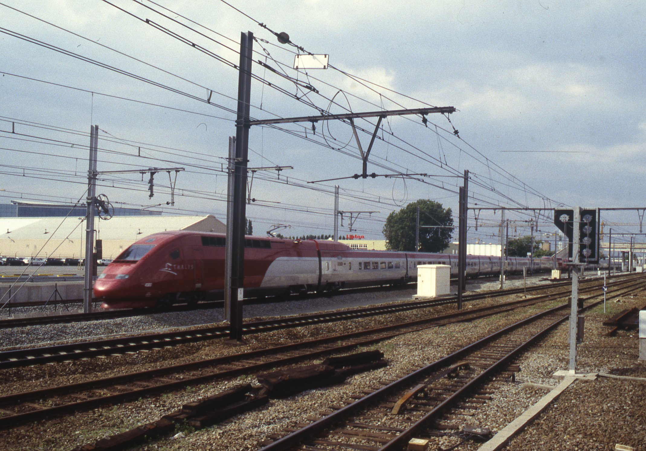 Een dubbele Thalystrein in de begintijd. Op de achtergrond de Lipton fabriek